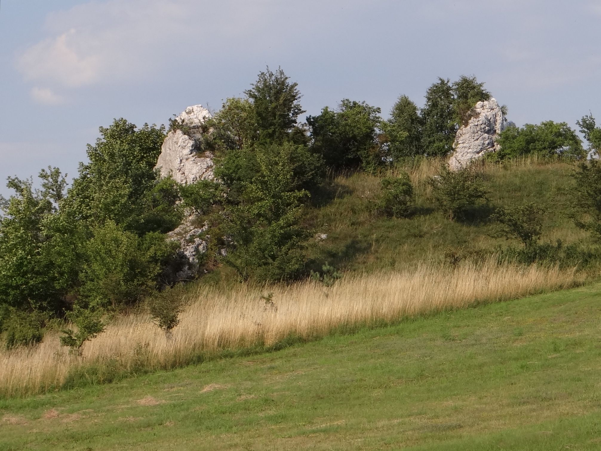 Polne Turniczki w Rzędkowicach